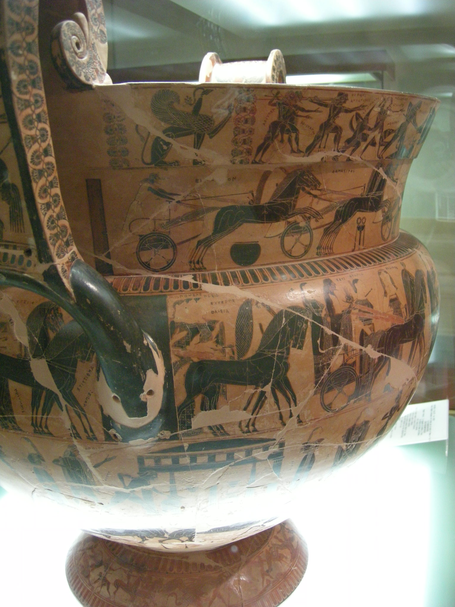 Athenian volute-krater.